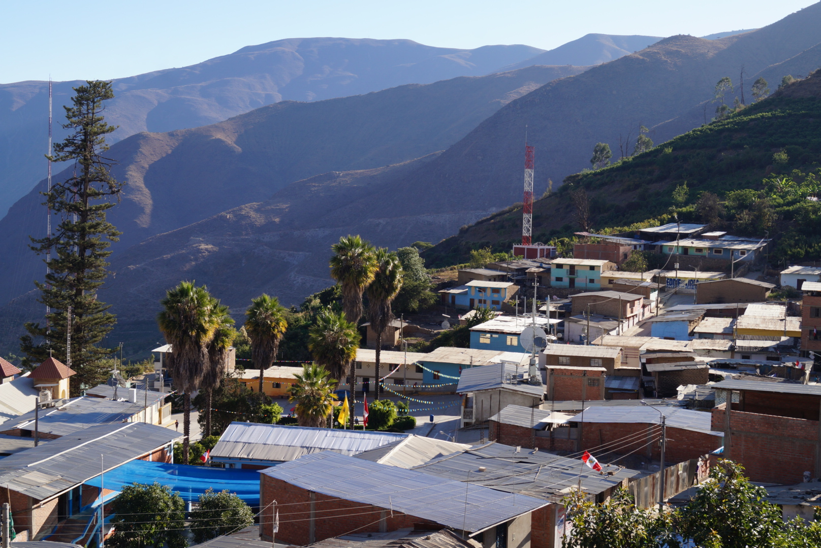 Imagen Panoramica del Distrito de Ambar